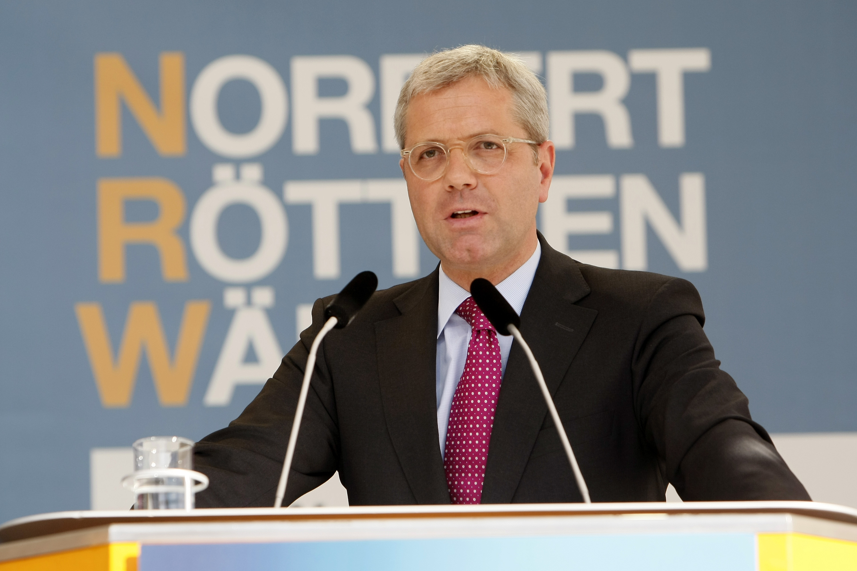 Norbert Röttgen im Wahlkampf zur Landtagswahl 2012 in Hamm